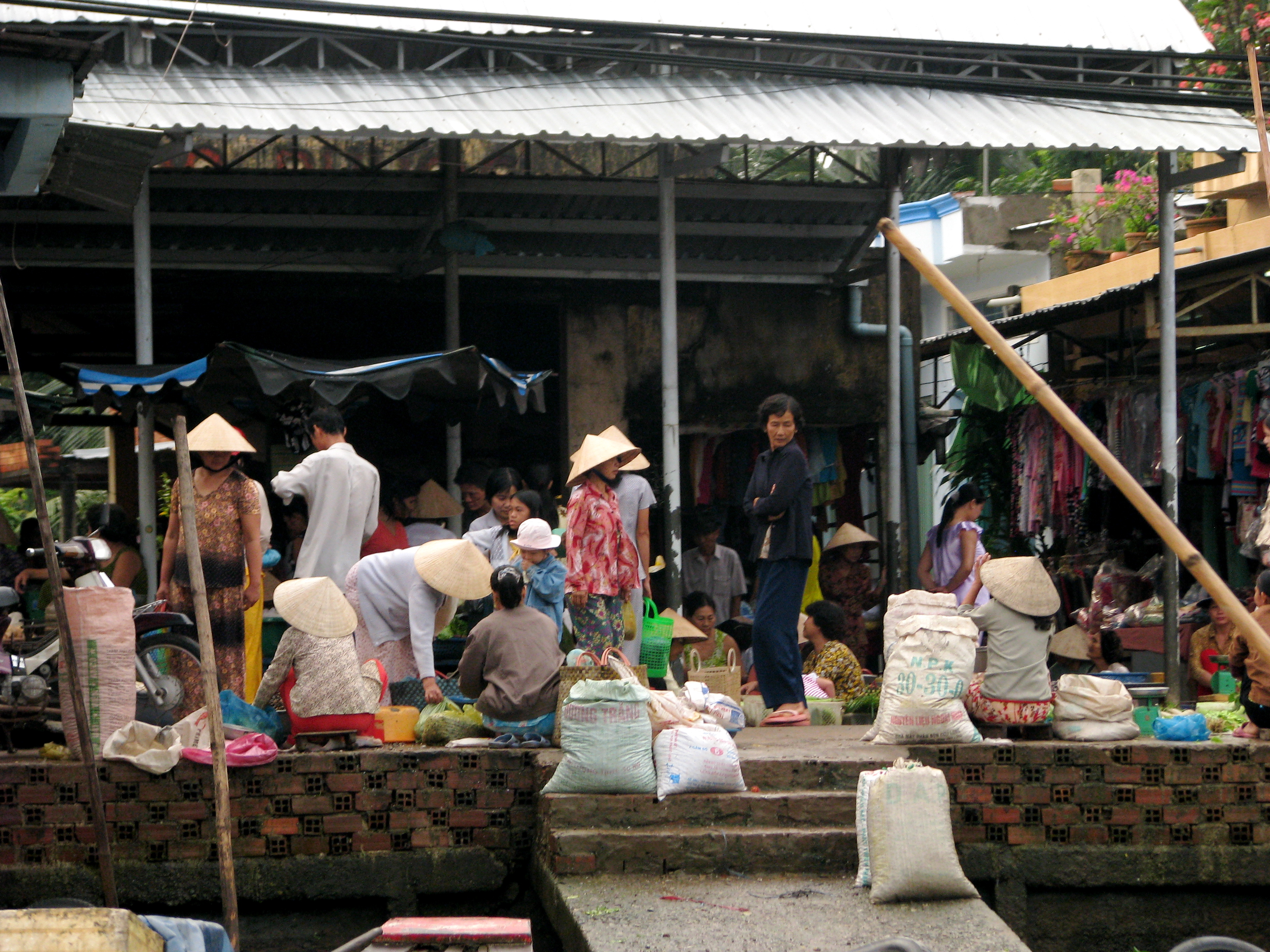 Buying and selling at a riverside market